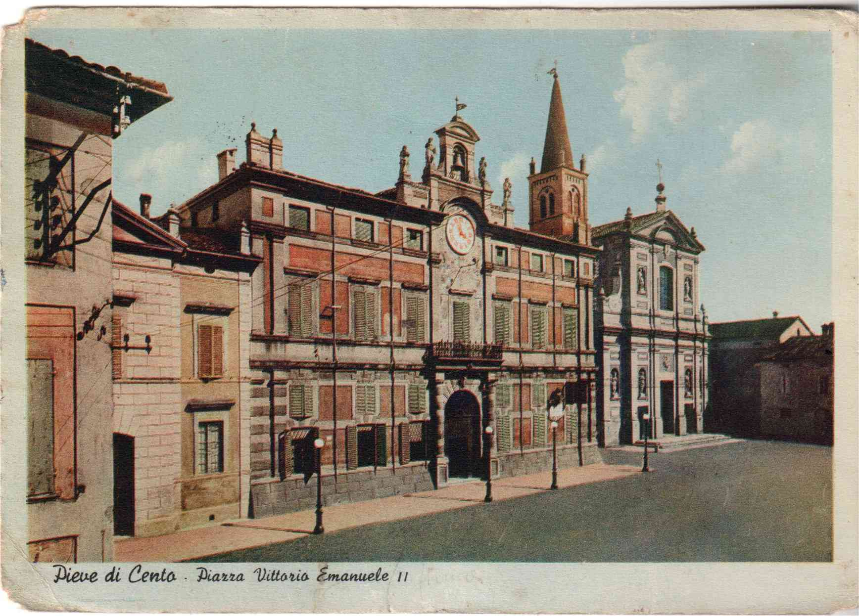 BO Pieve di Cento - piazza Vittorio Emanuele II